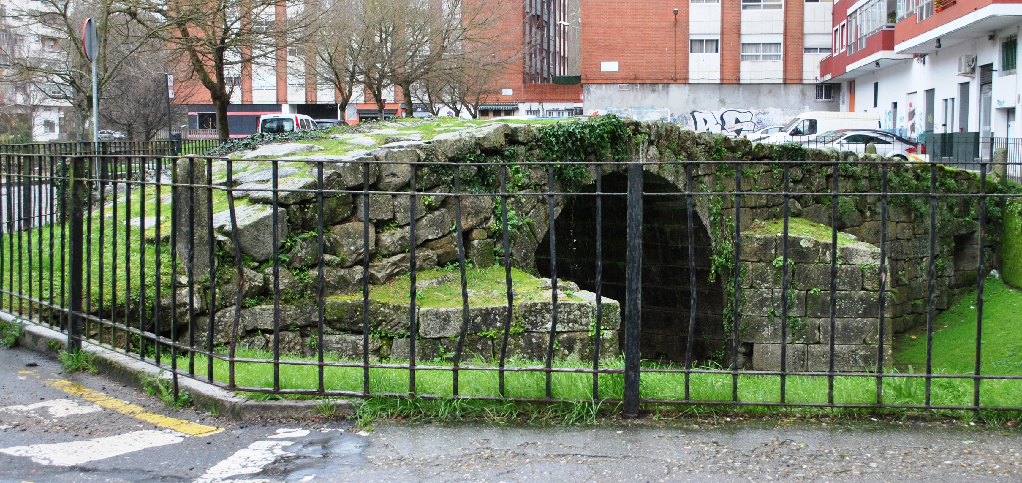 Ponte de Castrelos